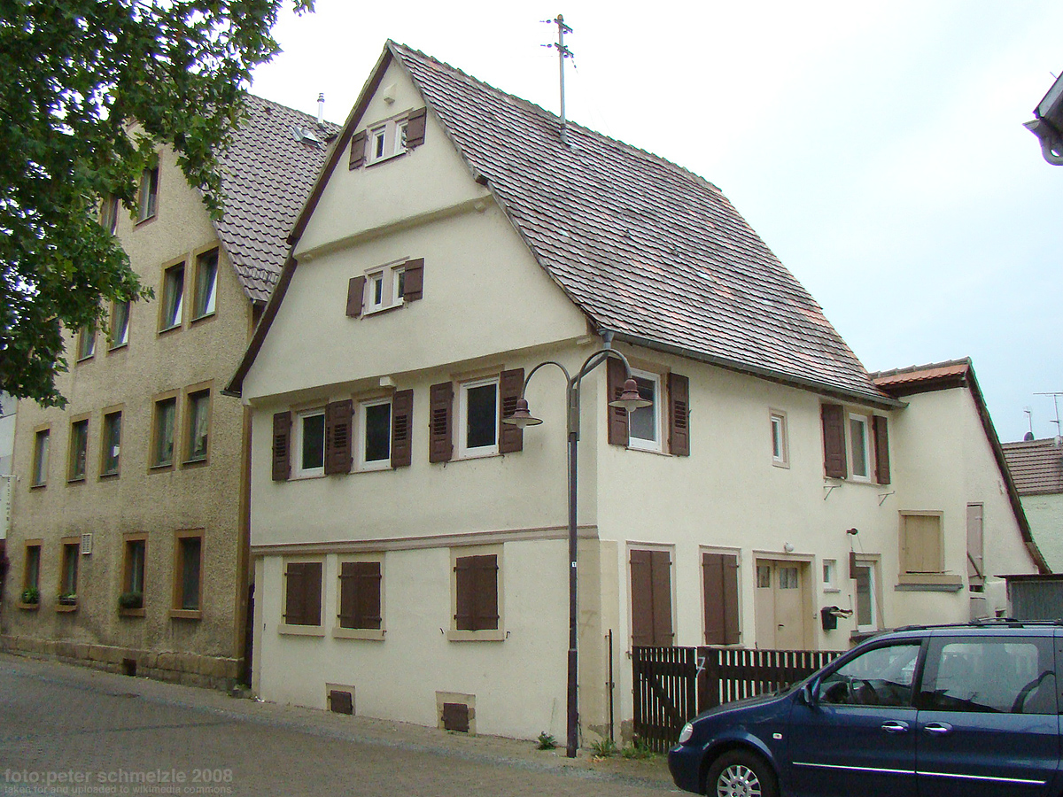 Denkmalgeschütztes Gebäude Schleusenstr. 7 in Heilbronn-Horkheim